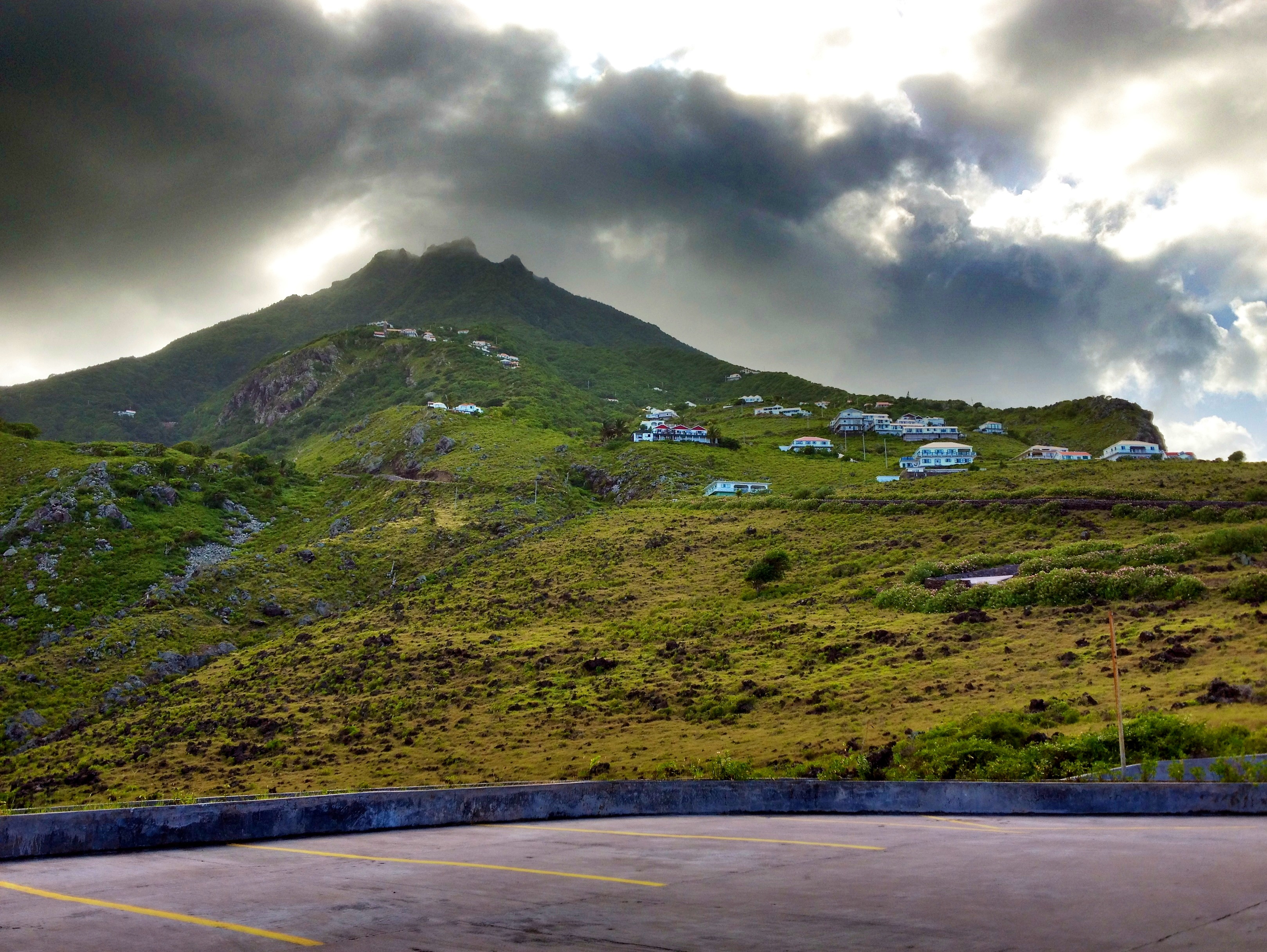 Vue sur Hell's Gate depuis l'aéroport